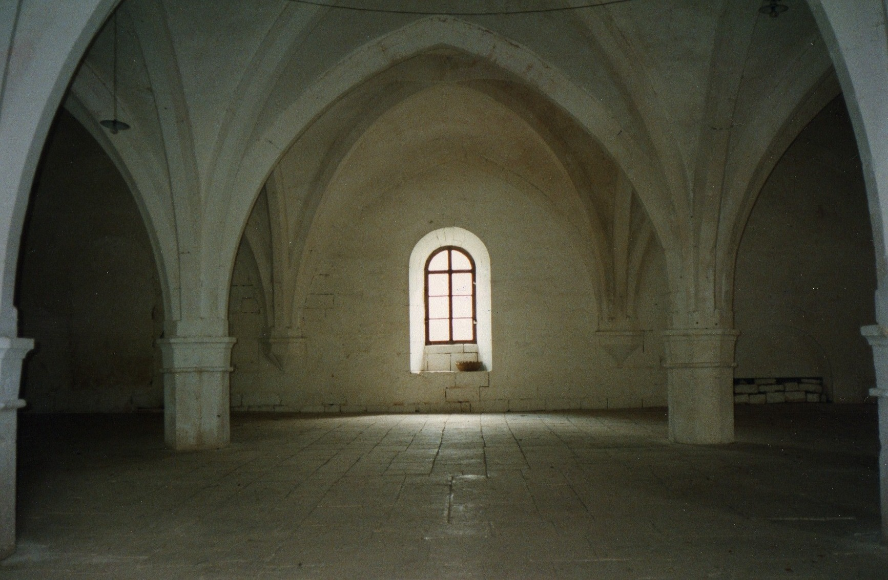 Abbaye de Longuay, ancien dortoir des converts